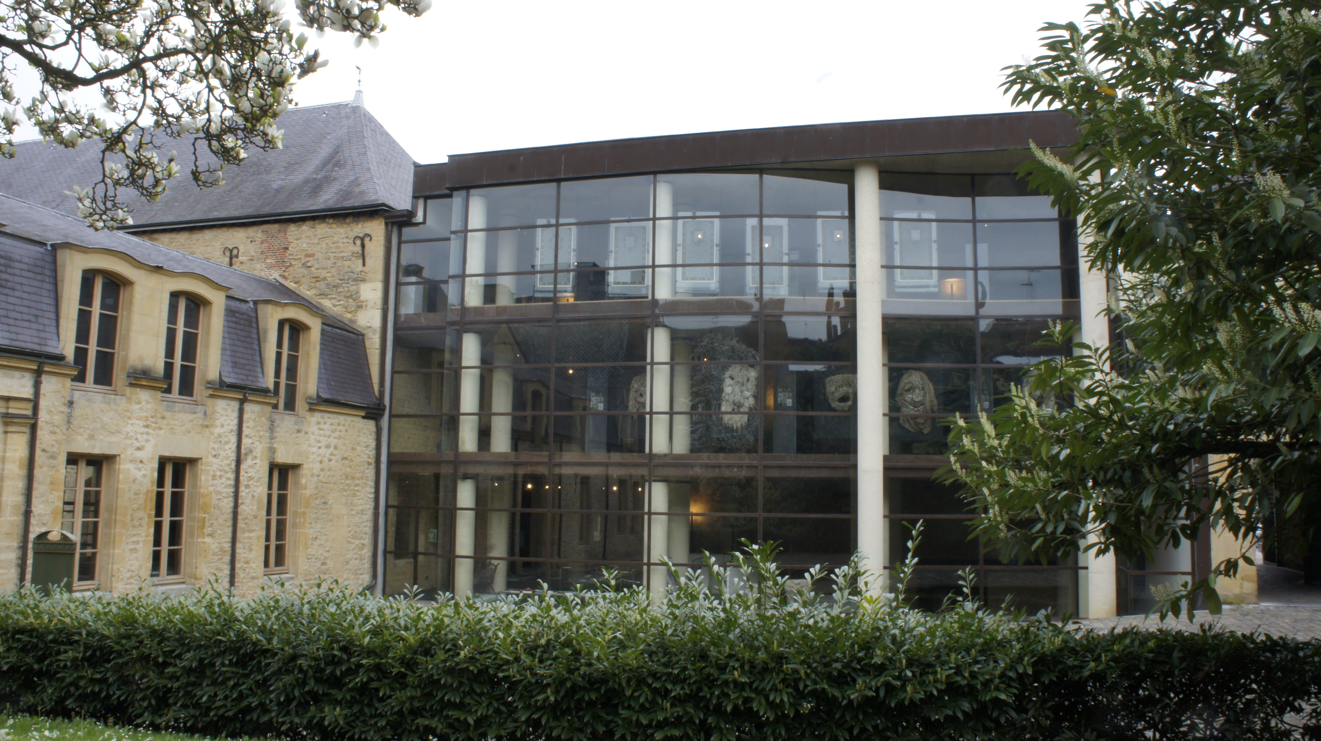 La façade sur le jardin.